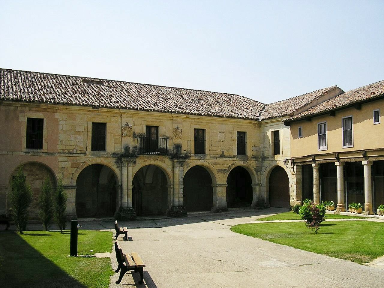 Monasterio cisterciense de San Andrés del Arroyo (Palencia)